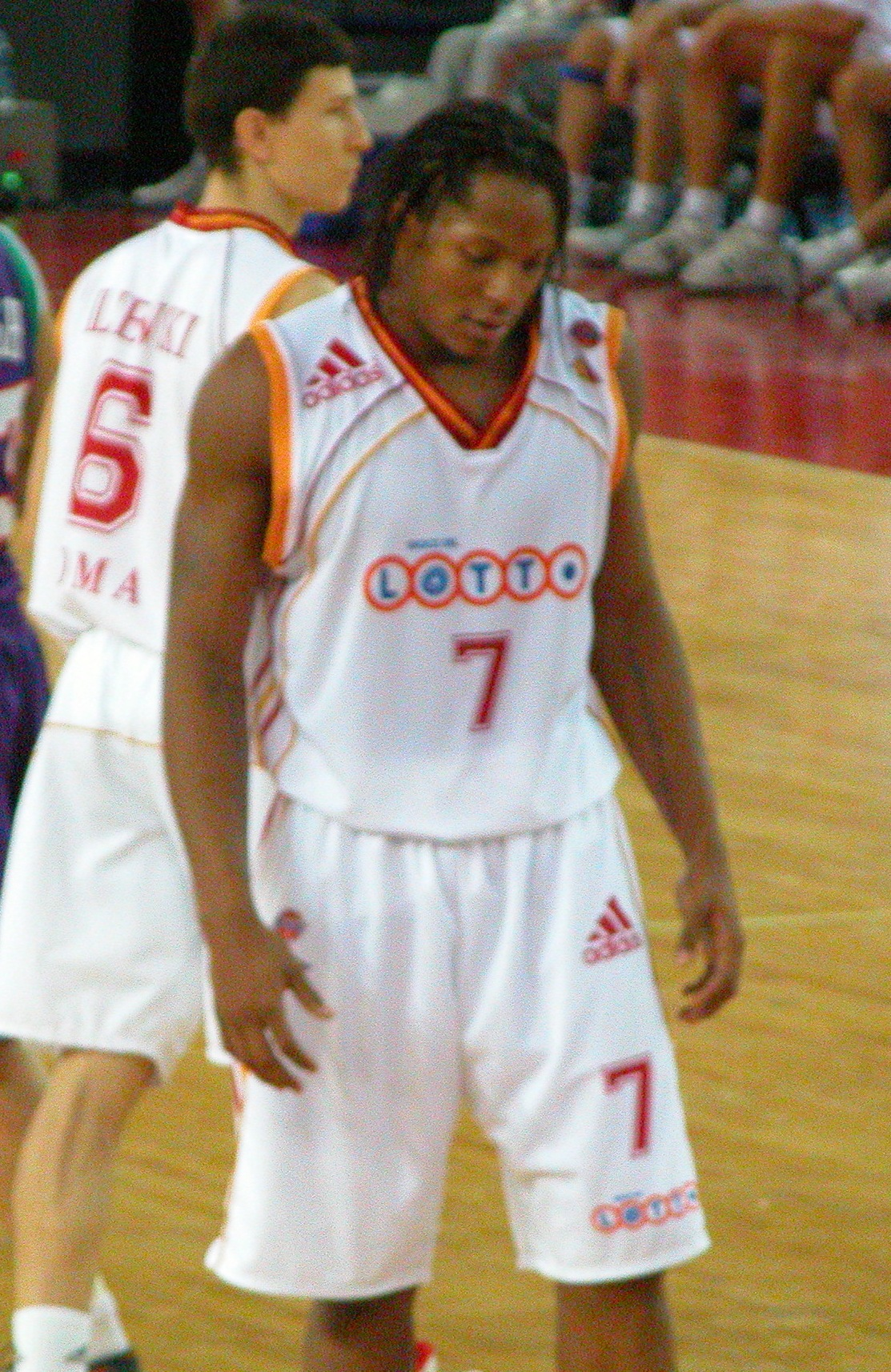 David Hawkins